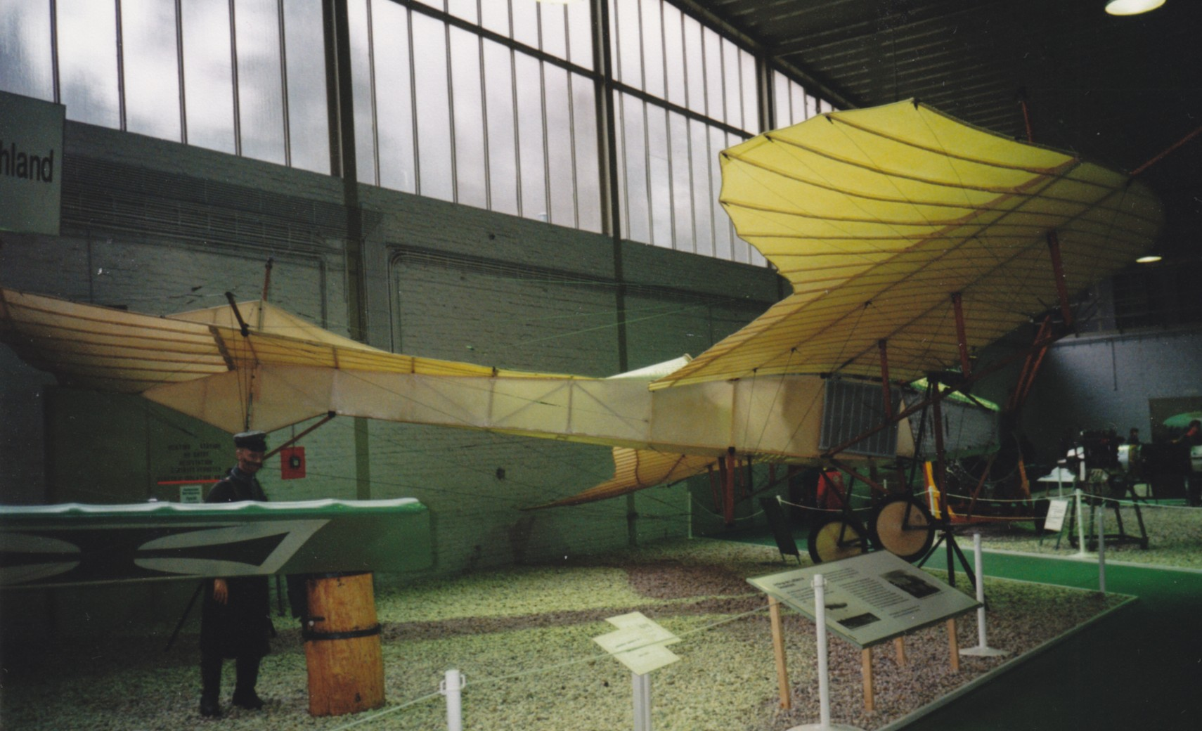 Replik der Etrich Taube. Foto Ende der 90ziger